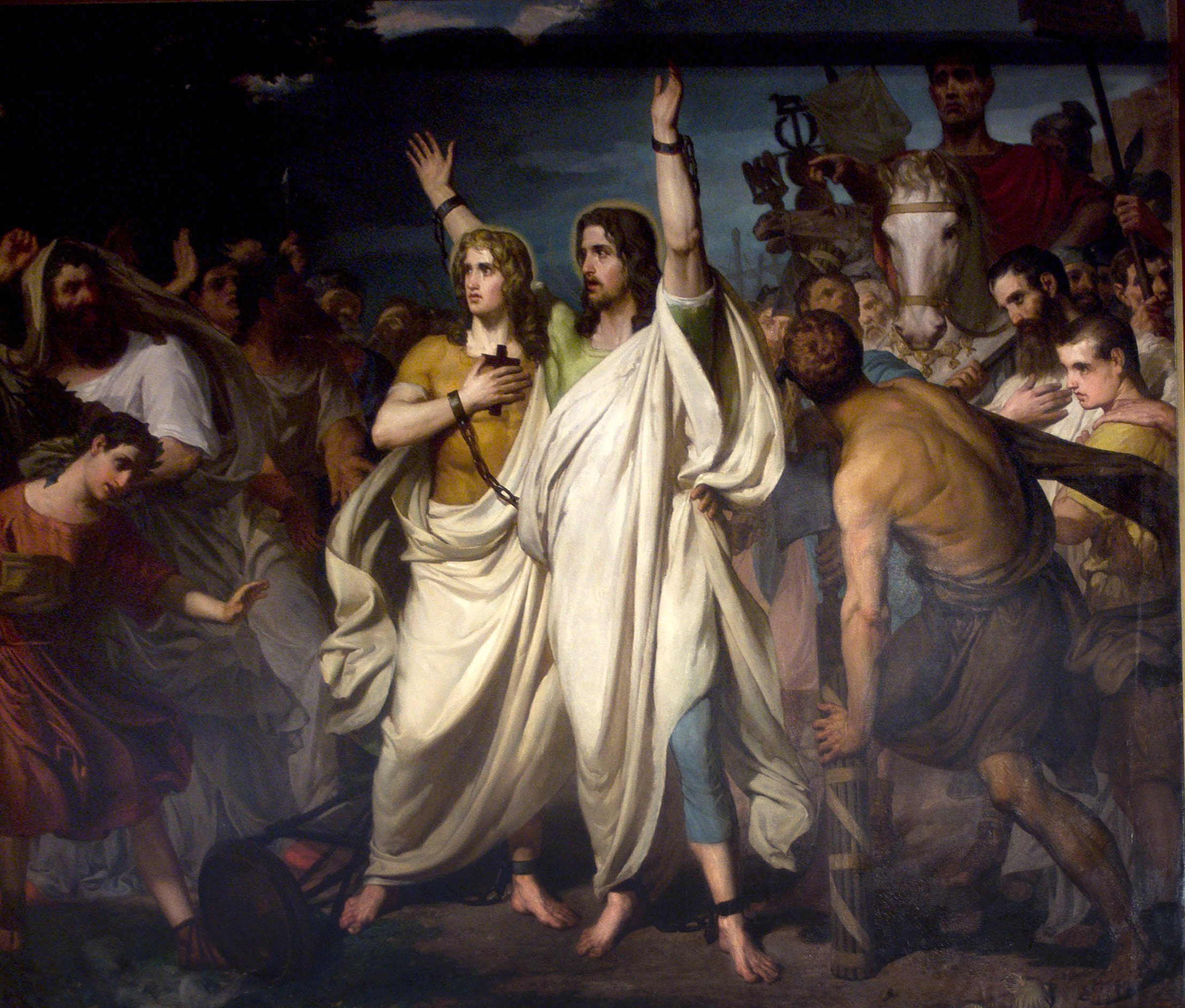 Són la representació de Sant Servand i Sant Germà. Patrons de Cadis, on residí i impartí classes Torras